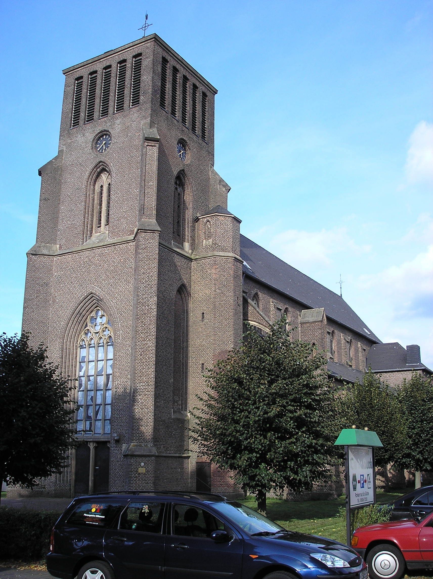 Die Kirche St. Antonius in Frasselt, Gemeinde Kranenburg